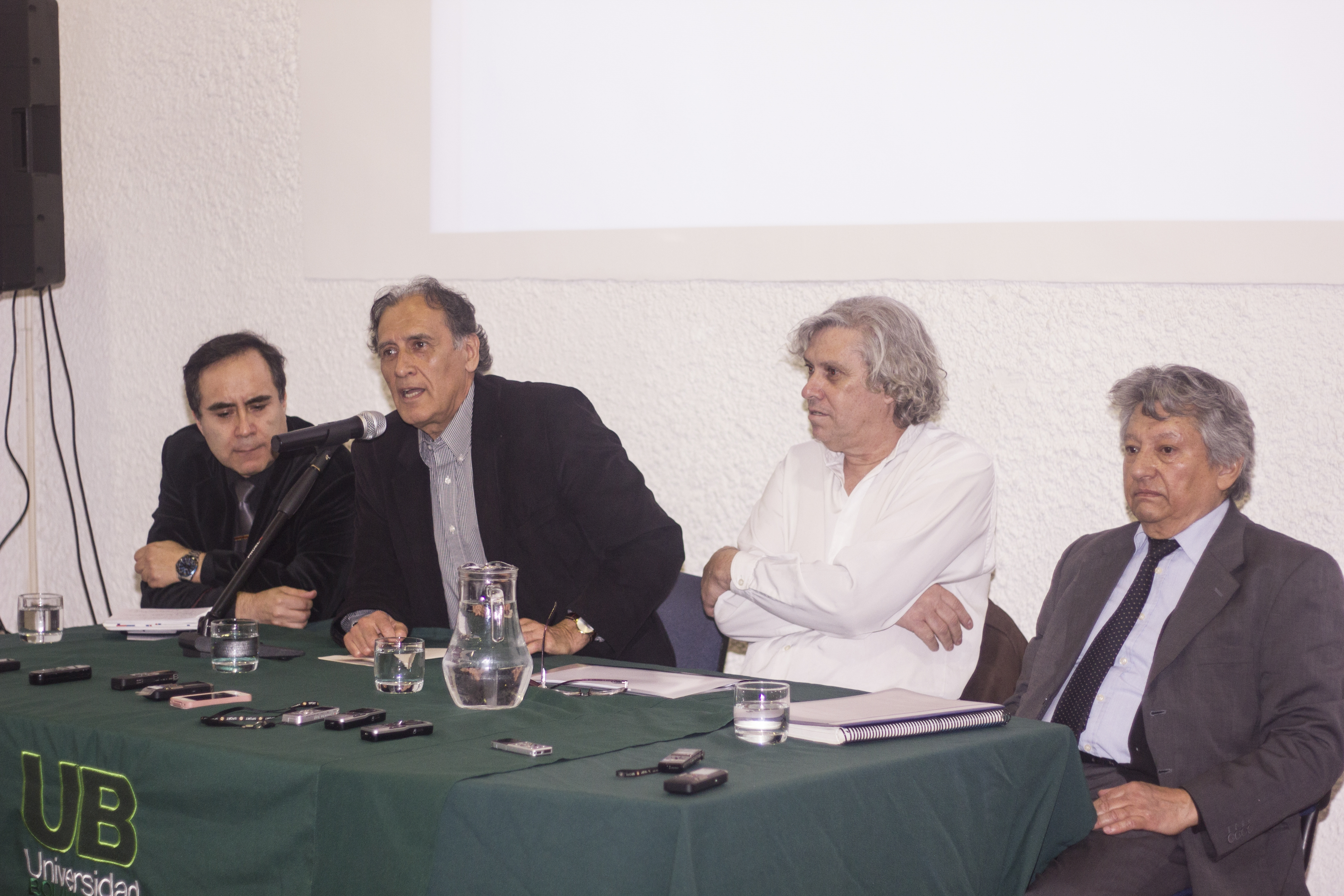 Profesores Manuel Jacques Parraguez, Francisco Estevez y Carlos Lopez Dawson